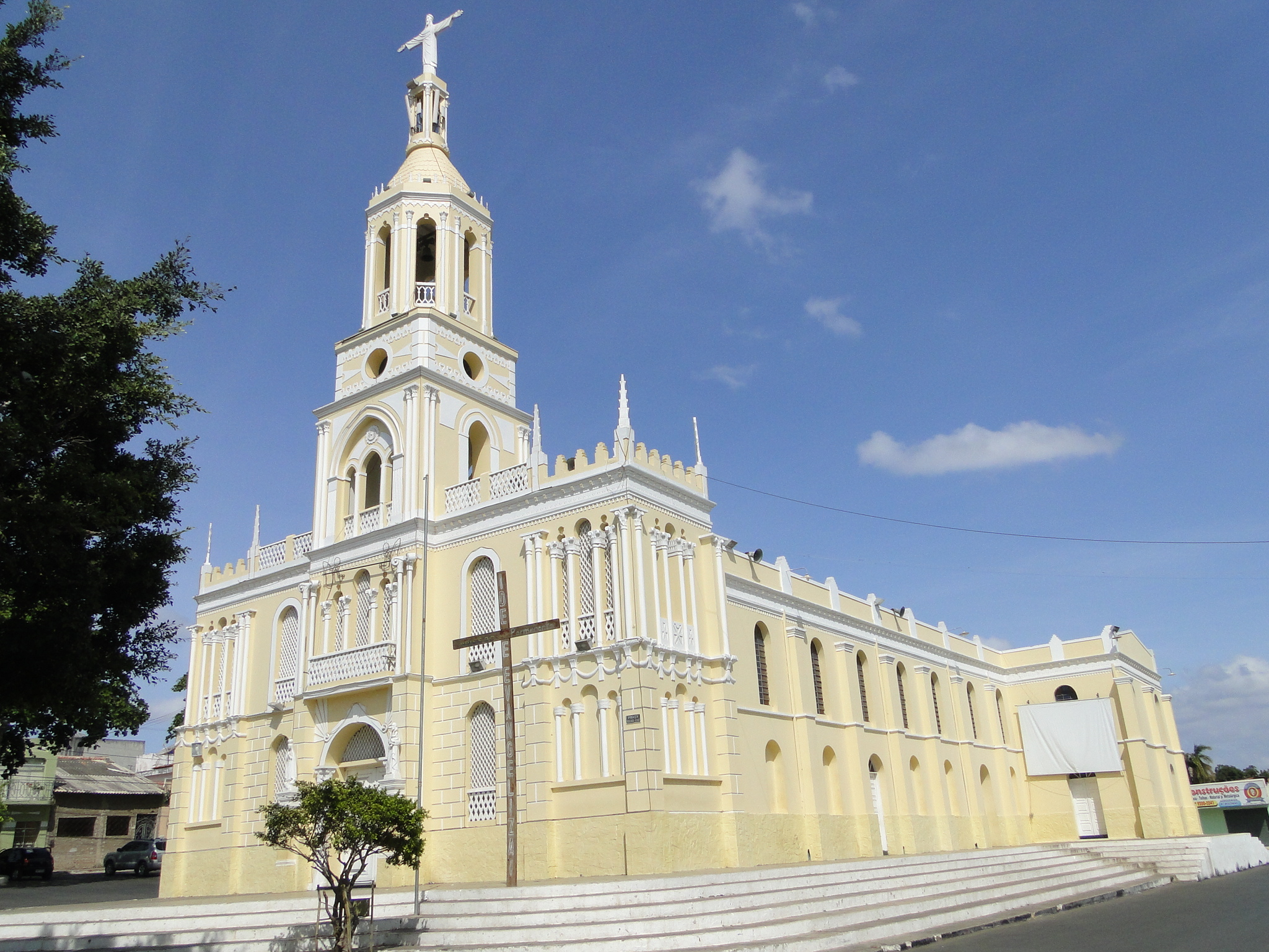 Catedral de Senhora Santana, cartão-postal de Tianguá. Por Derbson Frota